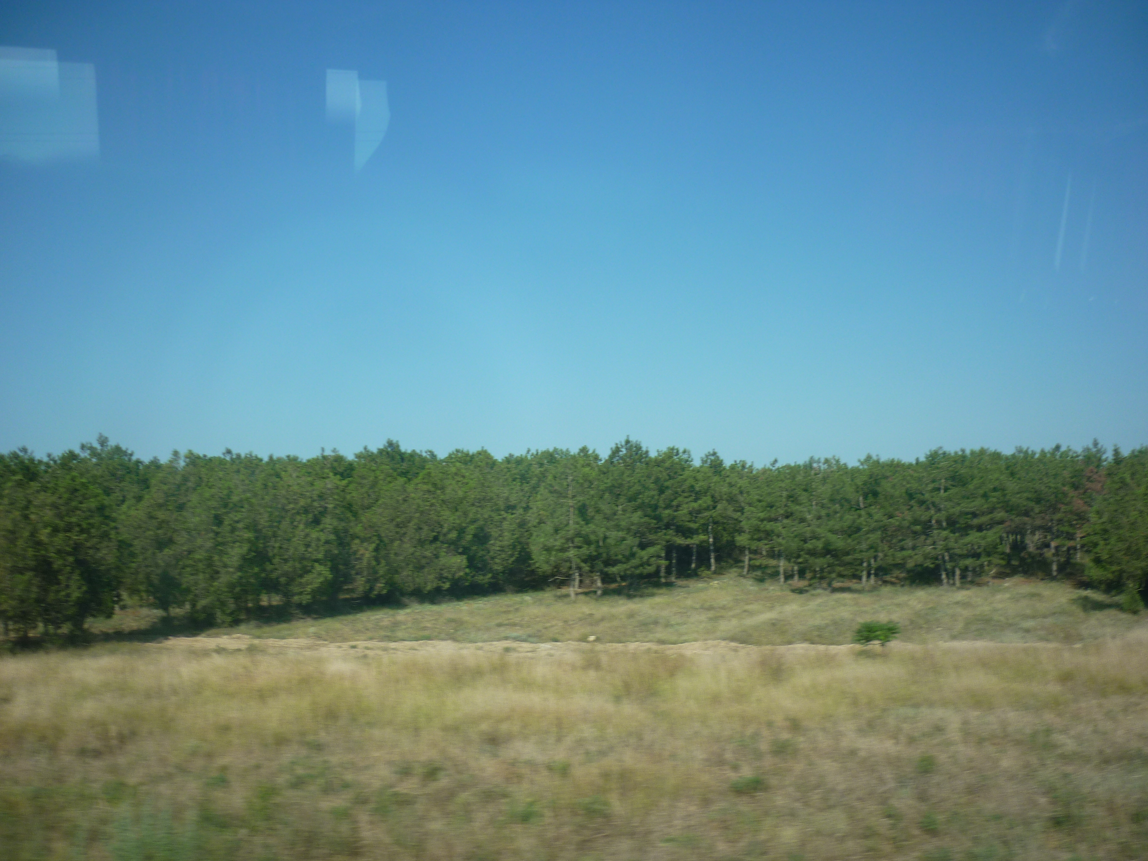 хвойні лісопосадки в парку міста Євпаторія Автономної республіки Крим